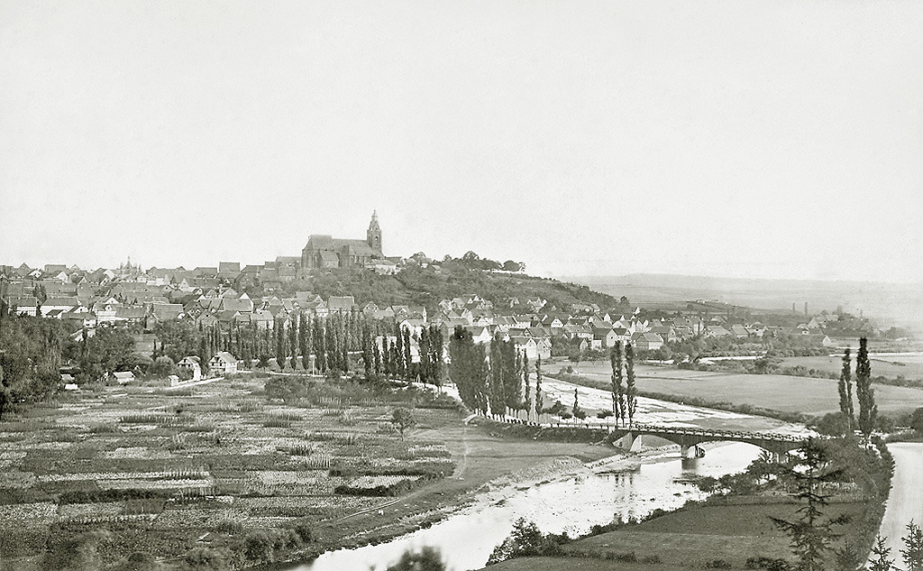 Ansicht von Frankenberg, um 1870. Blick auf den Ort vom Goßberg aus. Das Bild muss vor 1878 aufgenommen worden sein, da in diesem Jahr die Pappel der Wilhelmsstraße einem Orkan zum Opfer fielen.